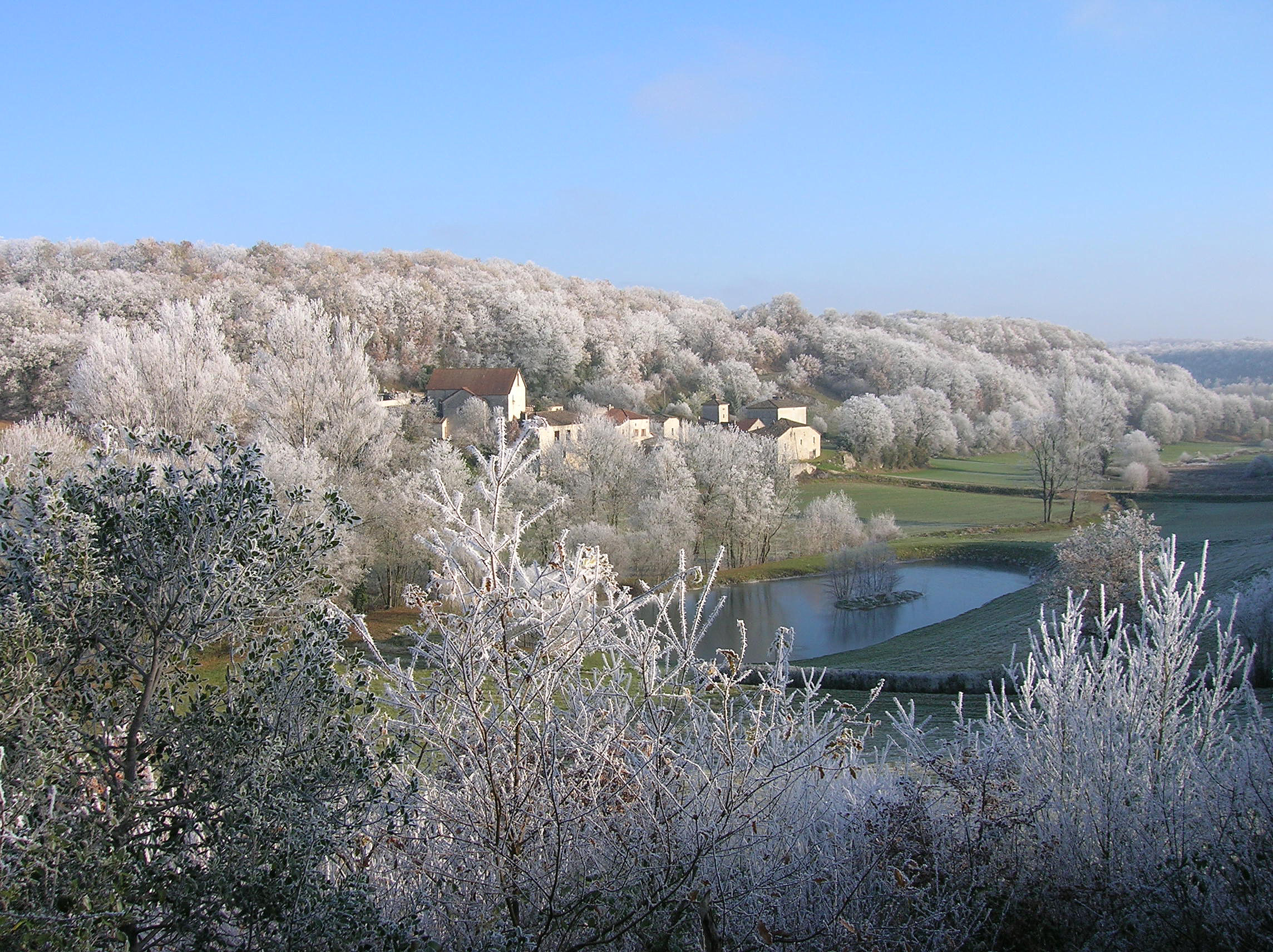 Le village de Valprionde (Lot, France).